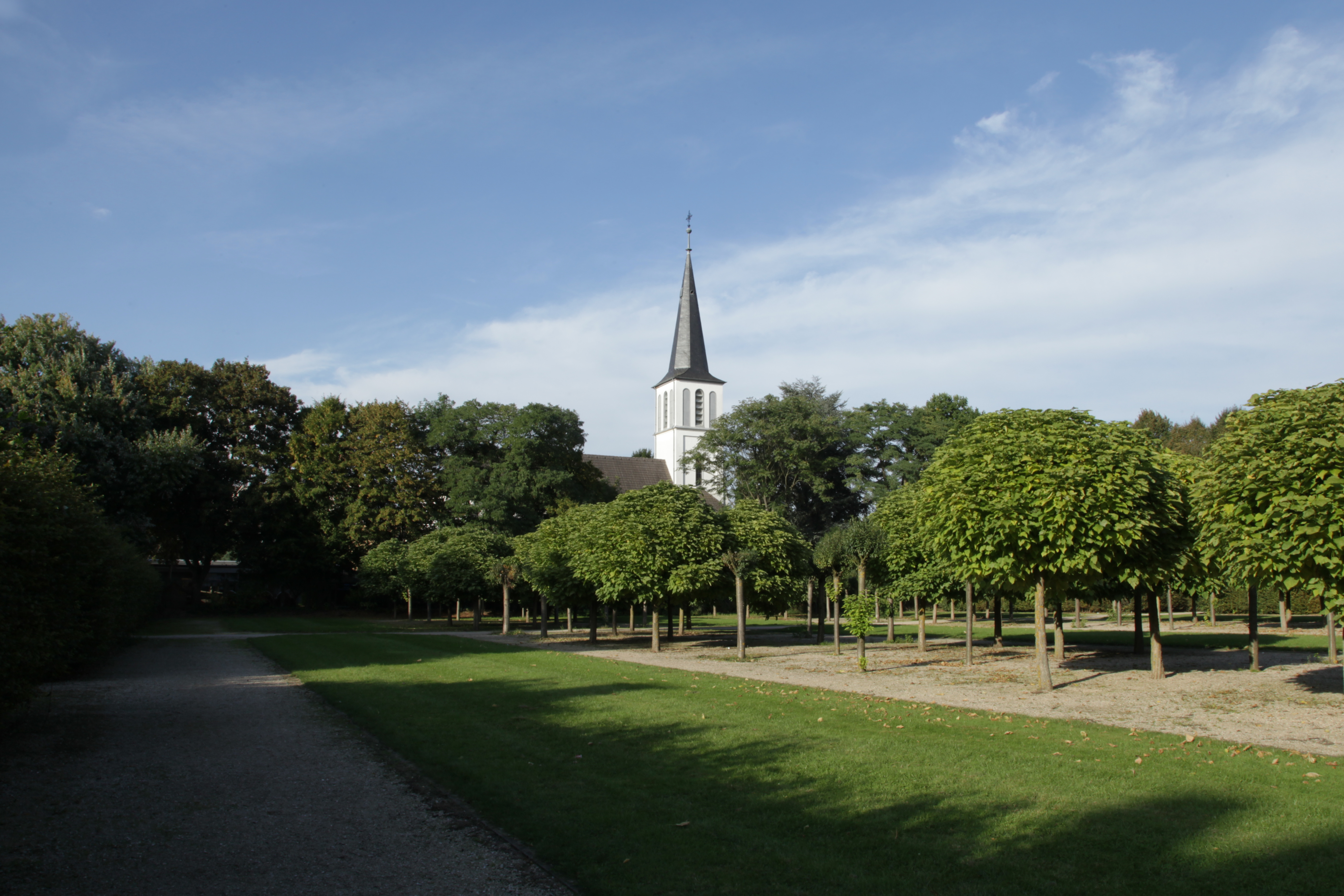 Nordgarten im Schlosspark von Schloss Augustusburg vor der Christuskirche in Brühl (Rheinland)